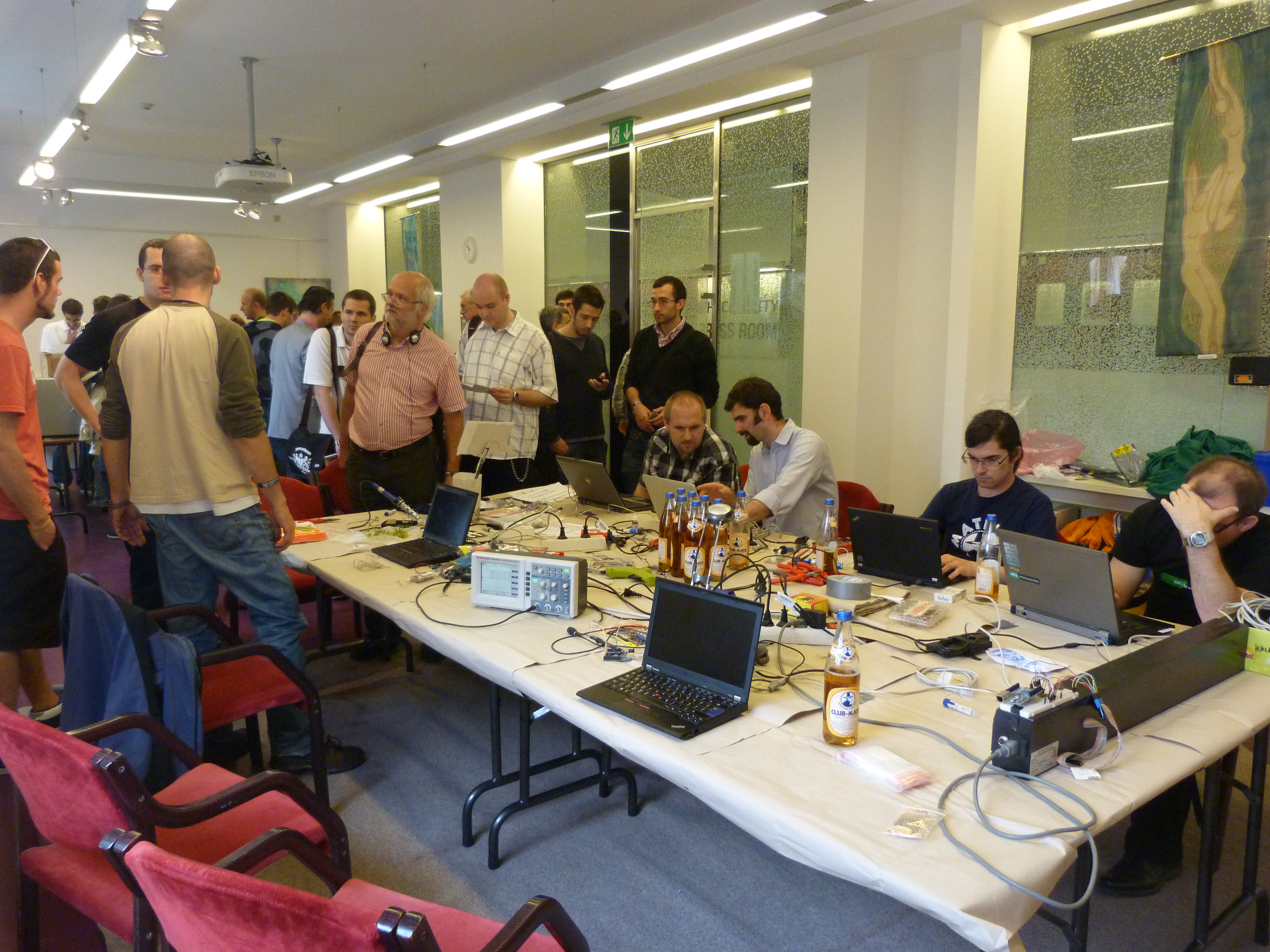 Hactivity. On the 12th and 13th of October, 2012. Budapest, MOM Cultural Center. The IT Security Festival in Central and Eastern Europe.©© Published under Creative Commons in the METAPOLISZ DVD line (from Metapolisz CD ISBN 963-229-987-6 to Metapolisz 260 DVD ISBN 978-615-5011-14-6 and from that on without an ISBN number) ©© Megjelent Creative Commons alatt a METAPOLISZ sorozatban (Metapolisz CD ISBN: 963-229-987-6 -tól – Metapolisz 260 DVD ISBN 978-615-5011-14-6 -ig számozott, majd ISBN számozás nélküli sorozat). Published under Creative Commons in the Metapolisz DVD line. All of the photos and vids in the Metapolisz DVD line are under Creative Commons and can be used even for commercial – for profit – purposes. Recommended Citation Derzsi Elekes Andor: Metapolisz DVD line Megjelent Creative Commons alatt a Metapolisz sorozatban. A Metapolisz sorozat valamennyi képe és filmje Creative Commons alatti valamint kereskedelmi - for profit - célra is felhasználható. Ajánlott hivatkozás: Derzsi Elekes Andor: Metapolisz DVD line Sources: Program leaftlet ISBN 978-963-08-4920-3, Kristof Csaba: Közeleg az etikus hackerek nagy fesztiválja Hacktivity 2012 Tags: Hactivity 2012 Budapest MOM Cultural Center